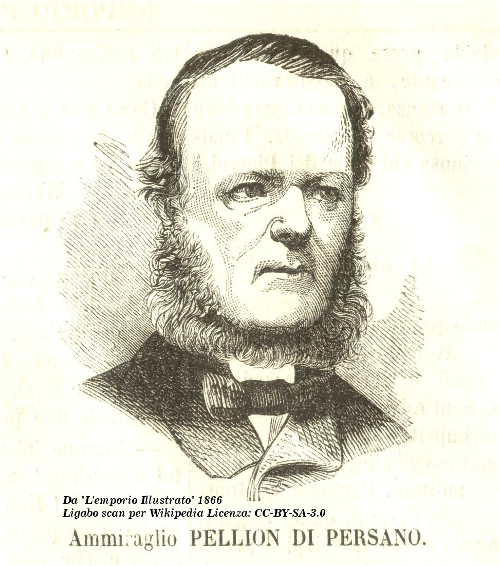 Ritratto dell'ammiraglio Pellion di Persano nel 1866.